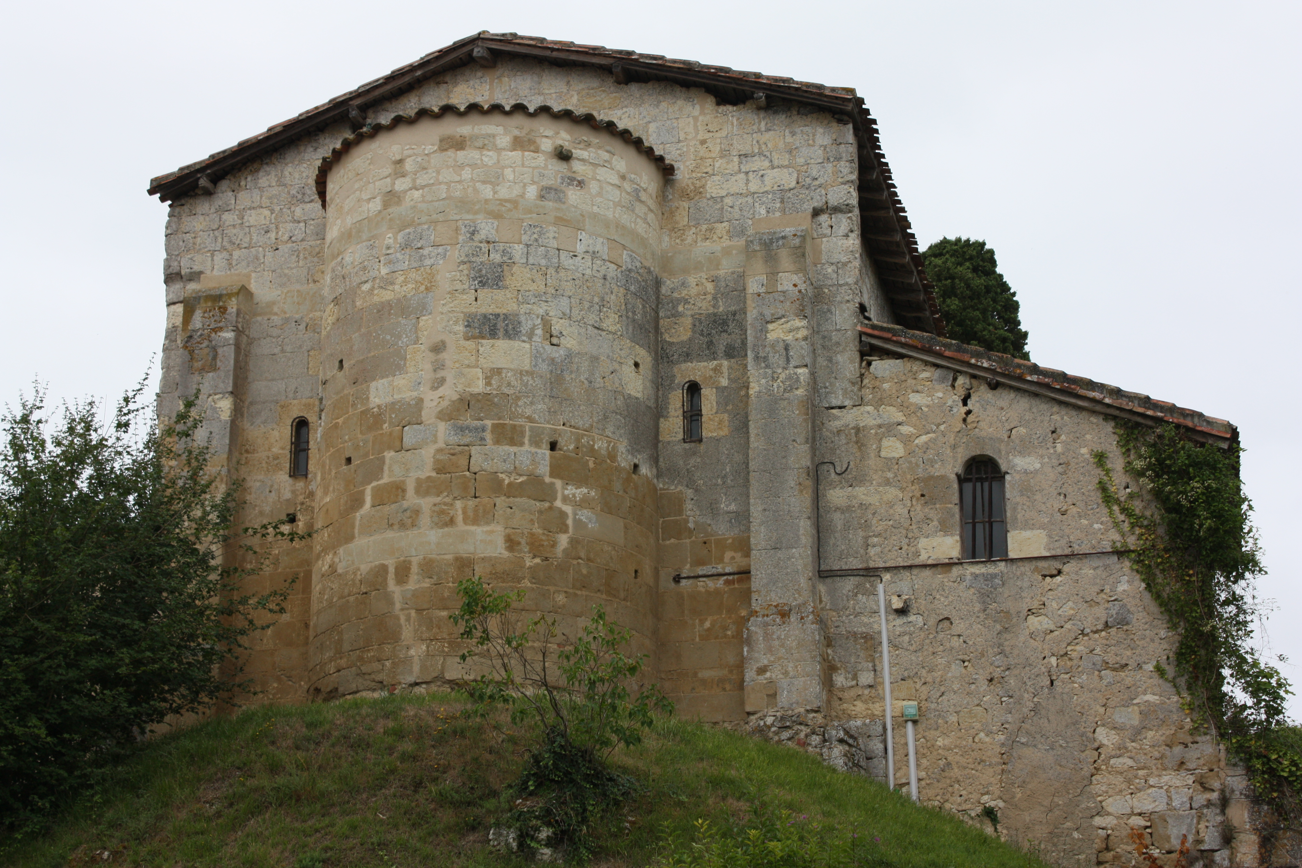 Peyrusse-Massas - Eglise Saint-Gilles Vue de l'Est